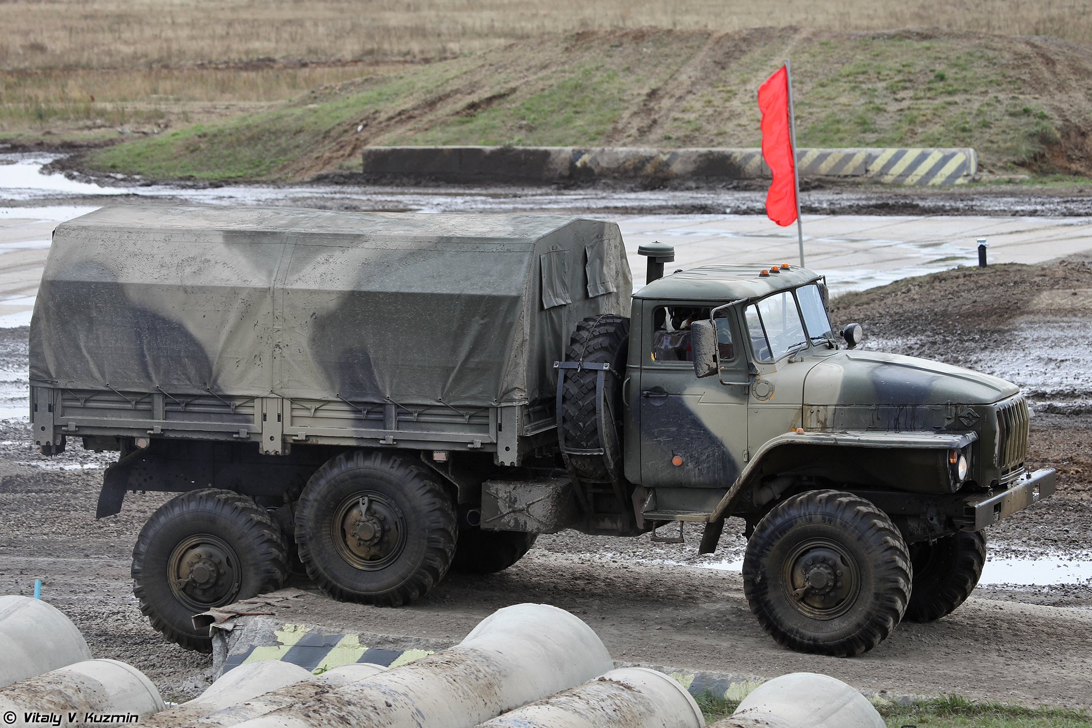 Урал-4320 (Ural-4320)